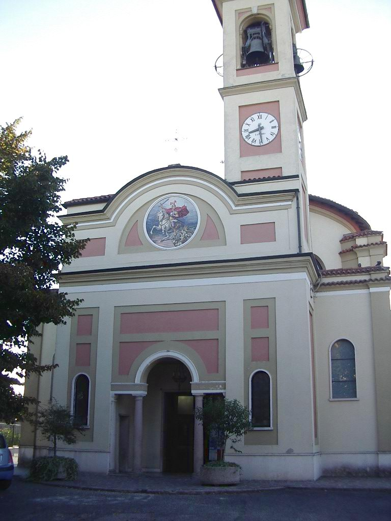 La chiesa parrocchiale di San Giorgio, nel centro storico (Dresano vecchio) di Dresano.